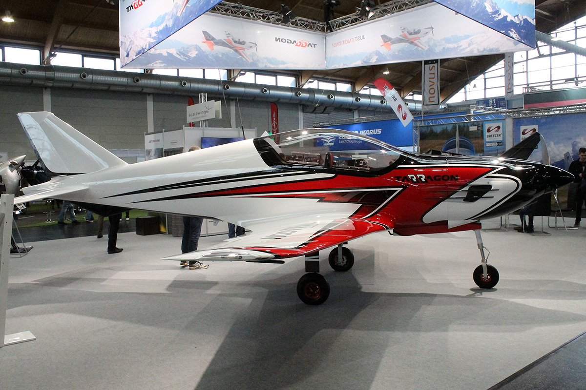 Unknown Pelegrin Tarragon @ Friedrichshafen 10/04/2019